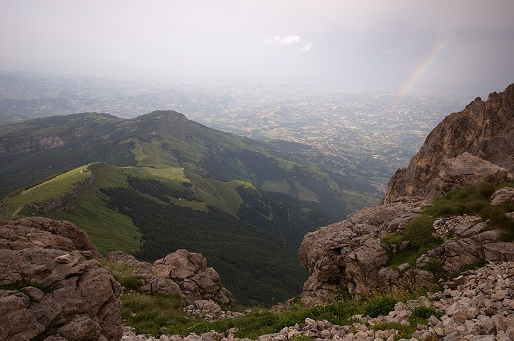 La vallata del teramano vista dal rifugio Franchetti (Gran Sasso d'Italia).